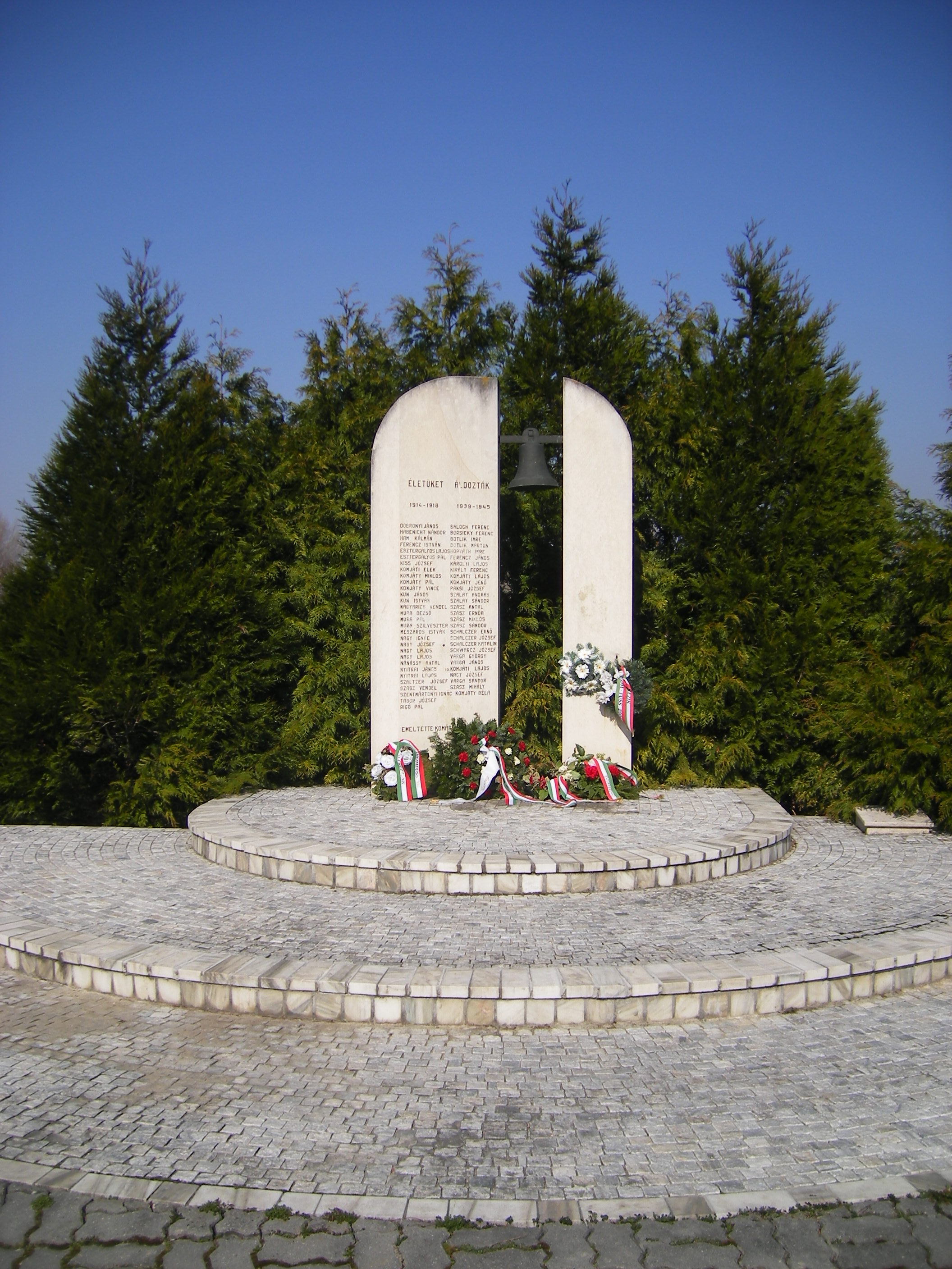 Komáromfüss - a két világháborúban elesettek emlékműve